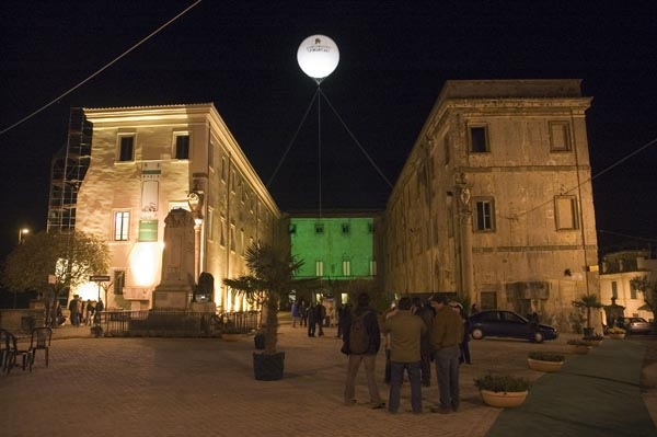 Palazzo "Rospigliosi" (Zagarolo) che ospiterà la sede di Touro University Rome, sede italiana del Touro College.